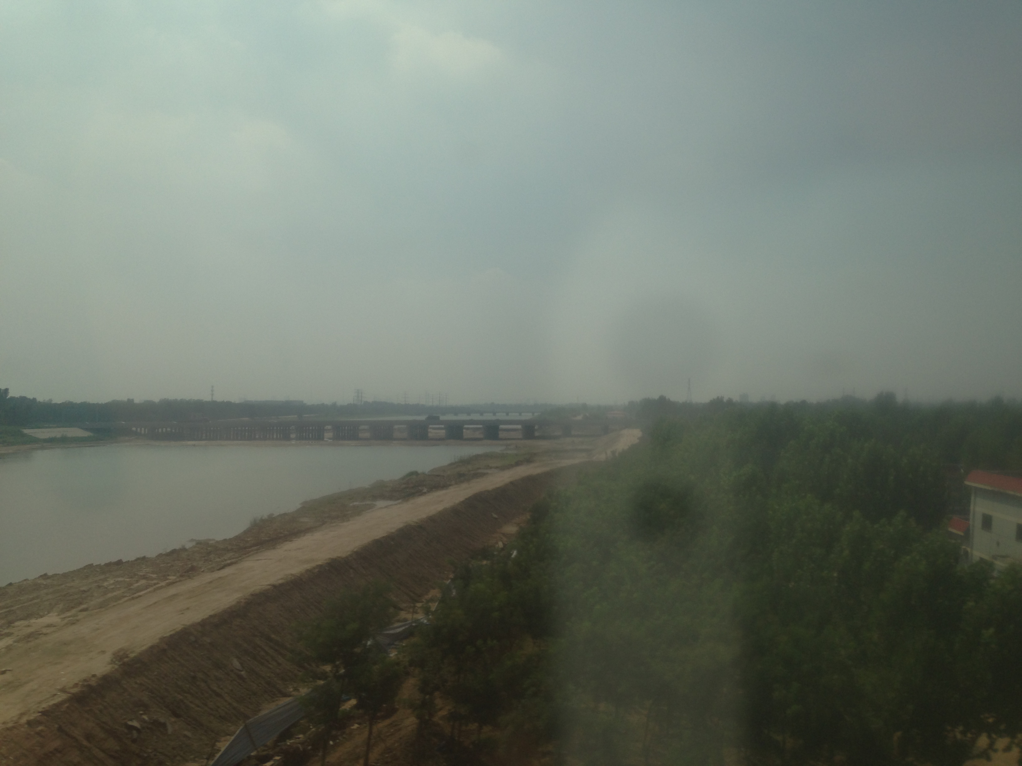 石武旅客専用線の列車内より望む順水河